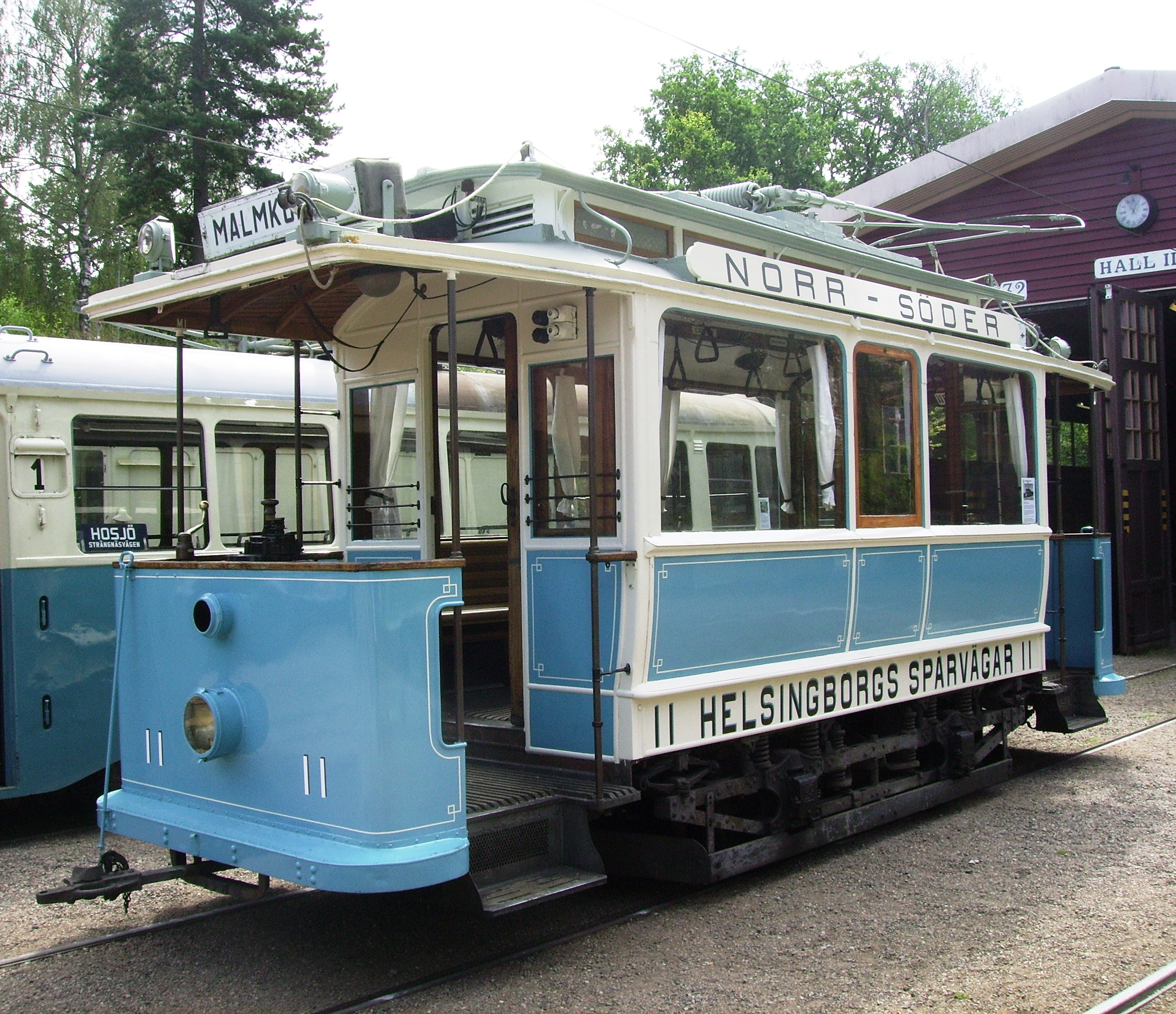 Picture of tram in Malmköping's museum. Waggon beloning to Helsingborgs Spårvagnar.